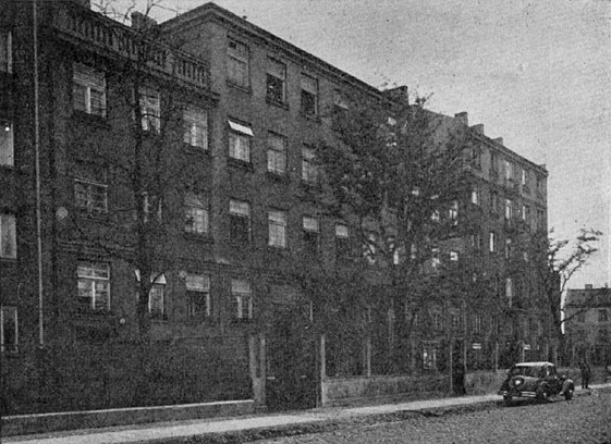 Obóz przejściowy dla cywilów wysyłanych na roboty do Niemiec w Warszawie, przy Skaryszewskiej 8. Zdjęcie opublikowane w publikacji z 1942